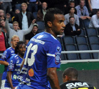 Álberis da Silva